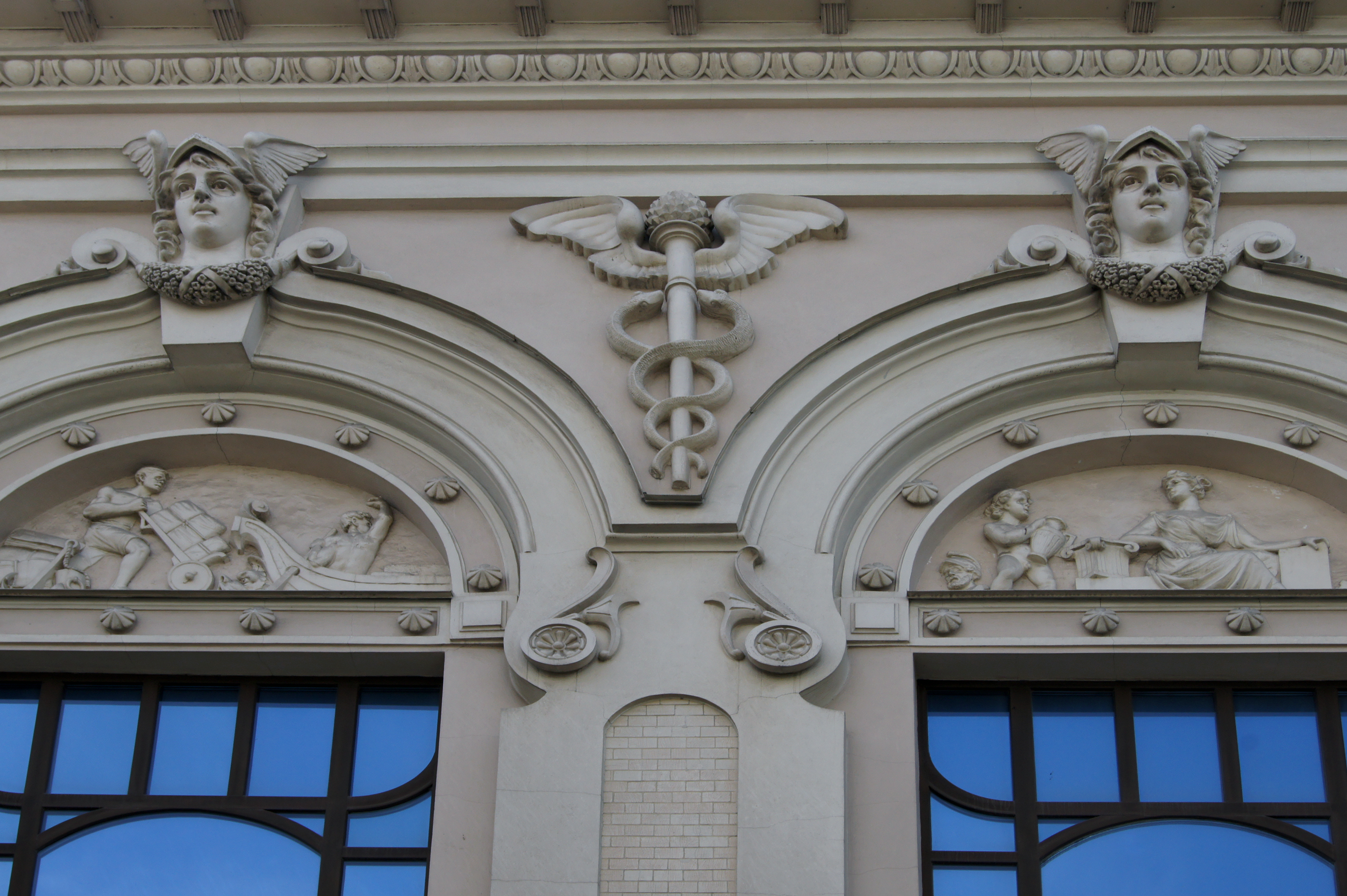 Доходный дом С. Яблокова. Оформление фасада.